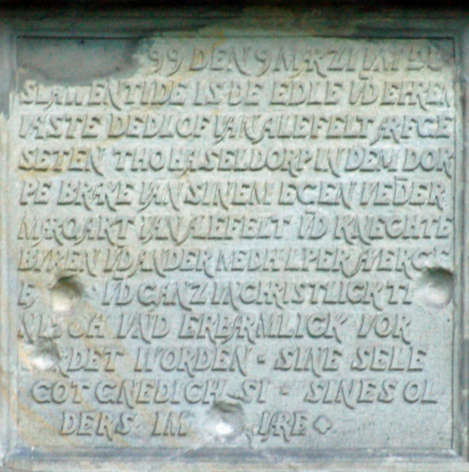 Gedenktafel an Detlev von Ahlefeldt an der Ostwand der St.-Gabriel-Kirche in Haseldorf . Inschrift: (ANN)O 1599 DEN 9 MARZI VM DE / SLAWENTIDE IS DE EDLE VD EHRE / V ASTE DEDLOF V AN ALE- FELT ARFGE / SETEN THO HASELDORP IN DEM DOR / PE BRAKE V AN SINEM EGEN VEDER / MARQART V AN ALEFELT VD KNECHTE / BVREN VD ANDER MEDHLPER A VERGE / F(AL- LEN) VD GANZ VNCHRISTLICK TI (RA)/NISCH VND ERBARMLICK VOR / (MO)RDET WORDEN. SINE SELE / GOT GNEDICH SI. SINES OL / DERS IM ... IARE.